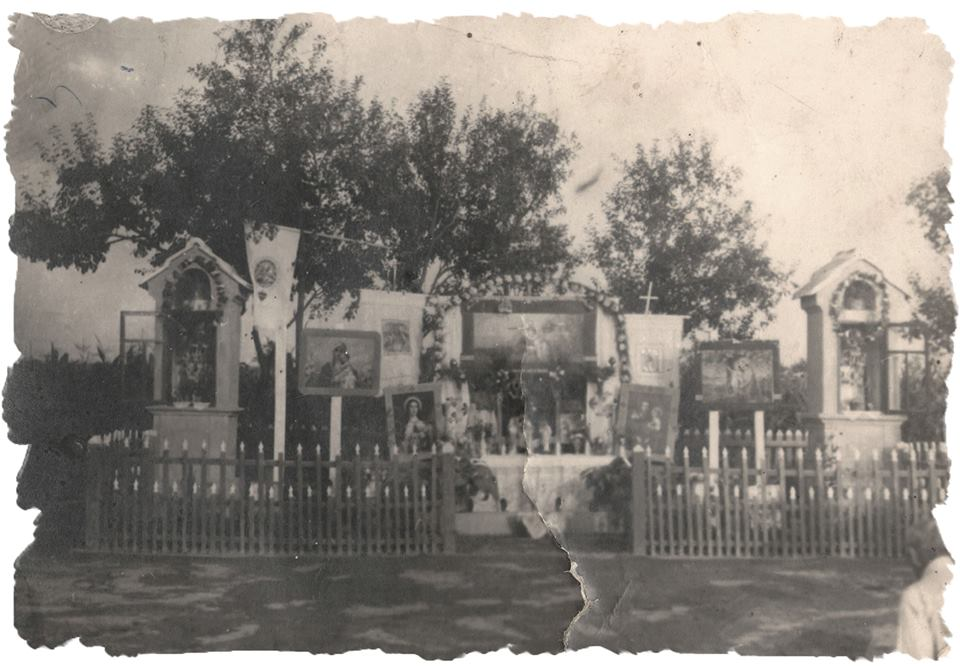 Svetište u Bošnjacima 1946.